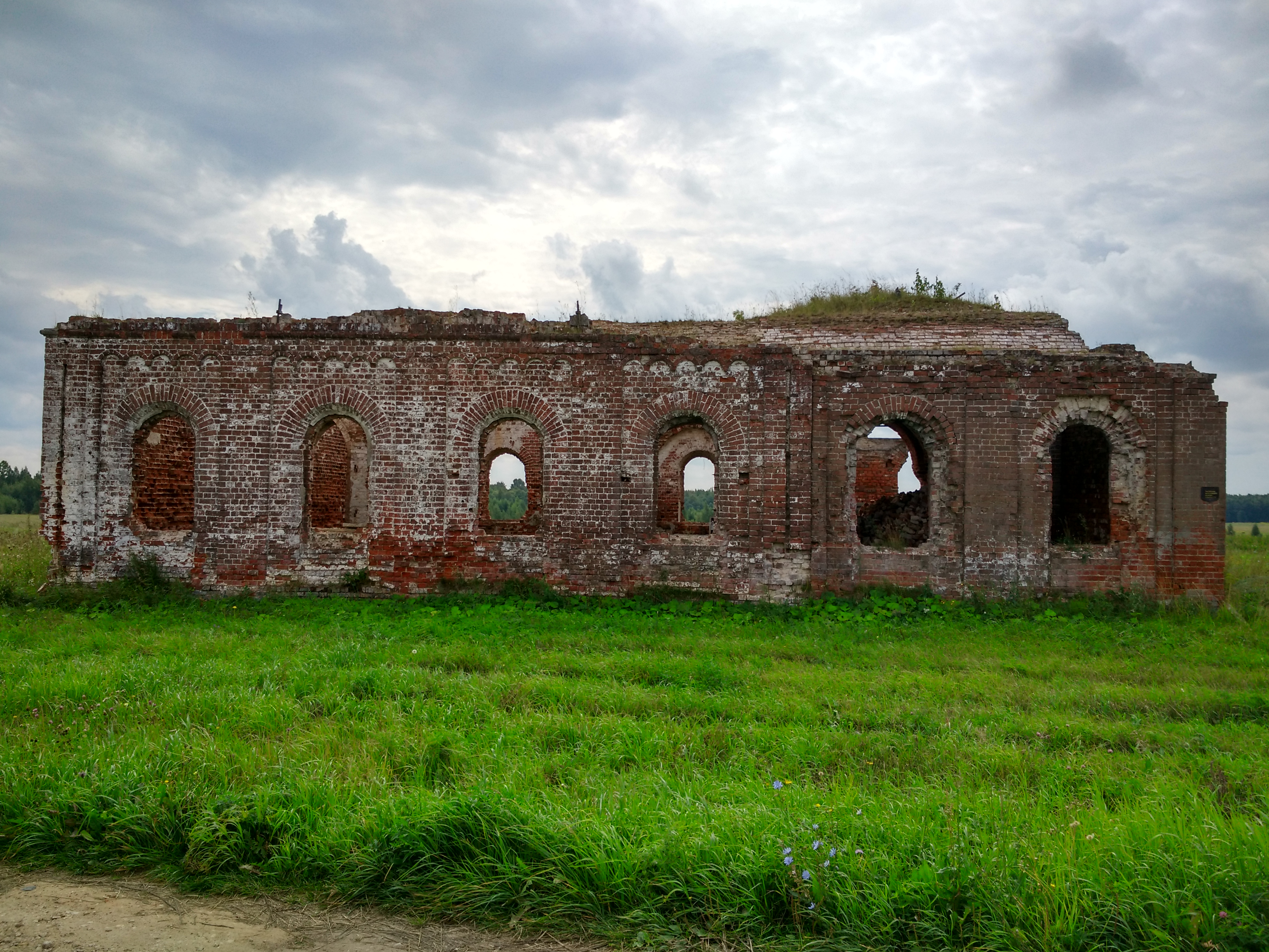 Церковь Святой Троицы: Малое Борисково, Суздальский район, Владимирская область